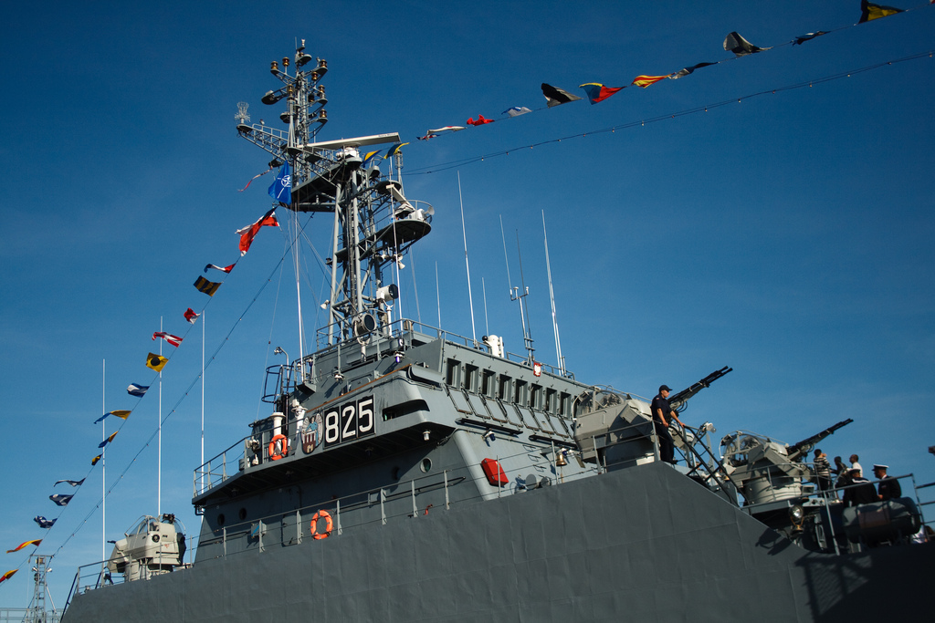 ORP Toruń.